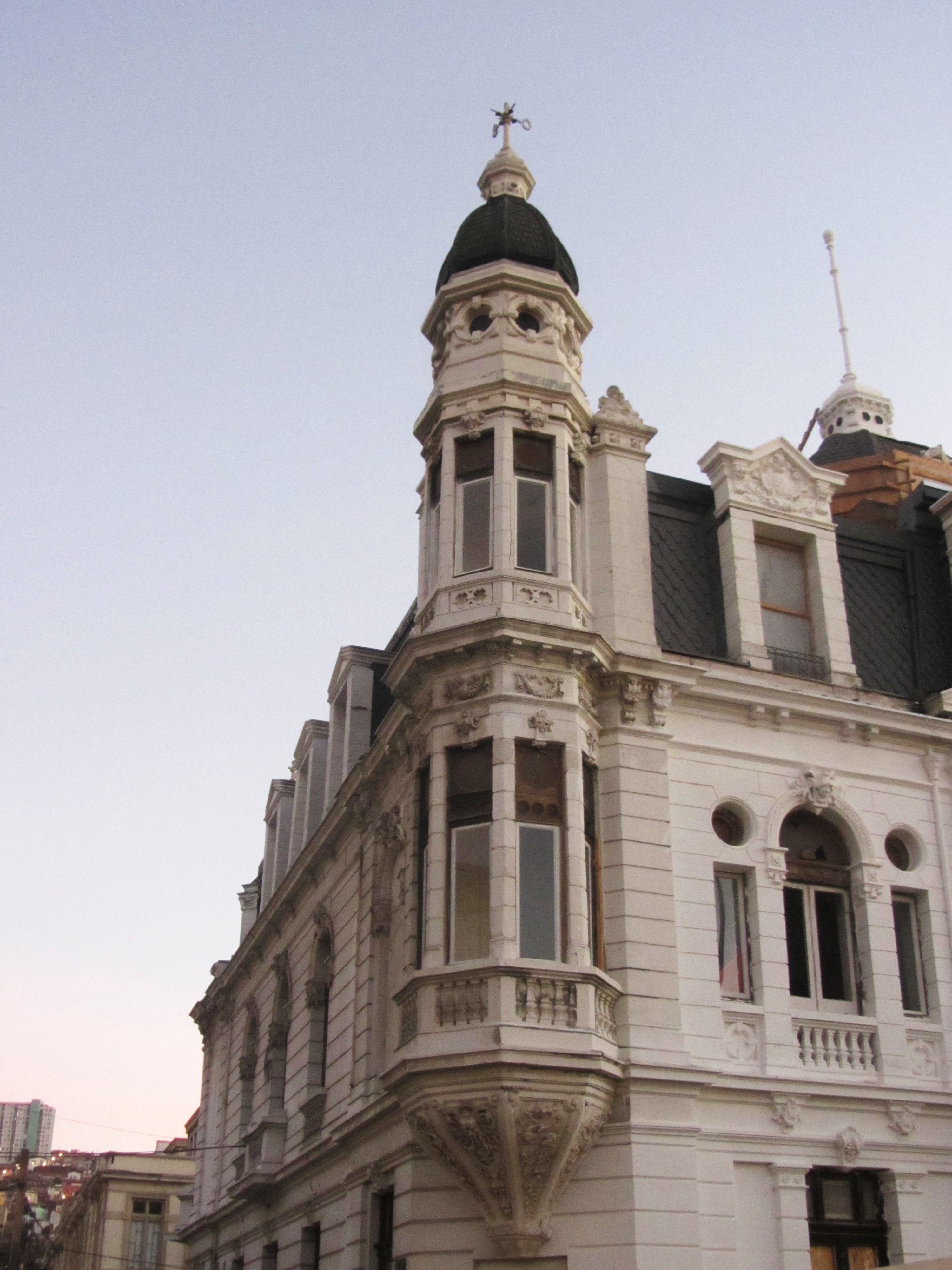 Detalle de la torre del Palacio Polanco Valparaíso, Chile